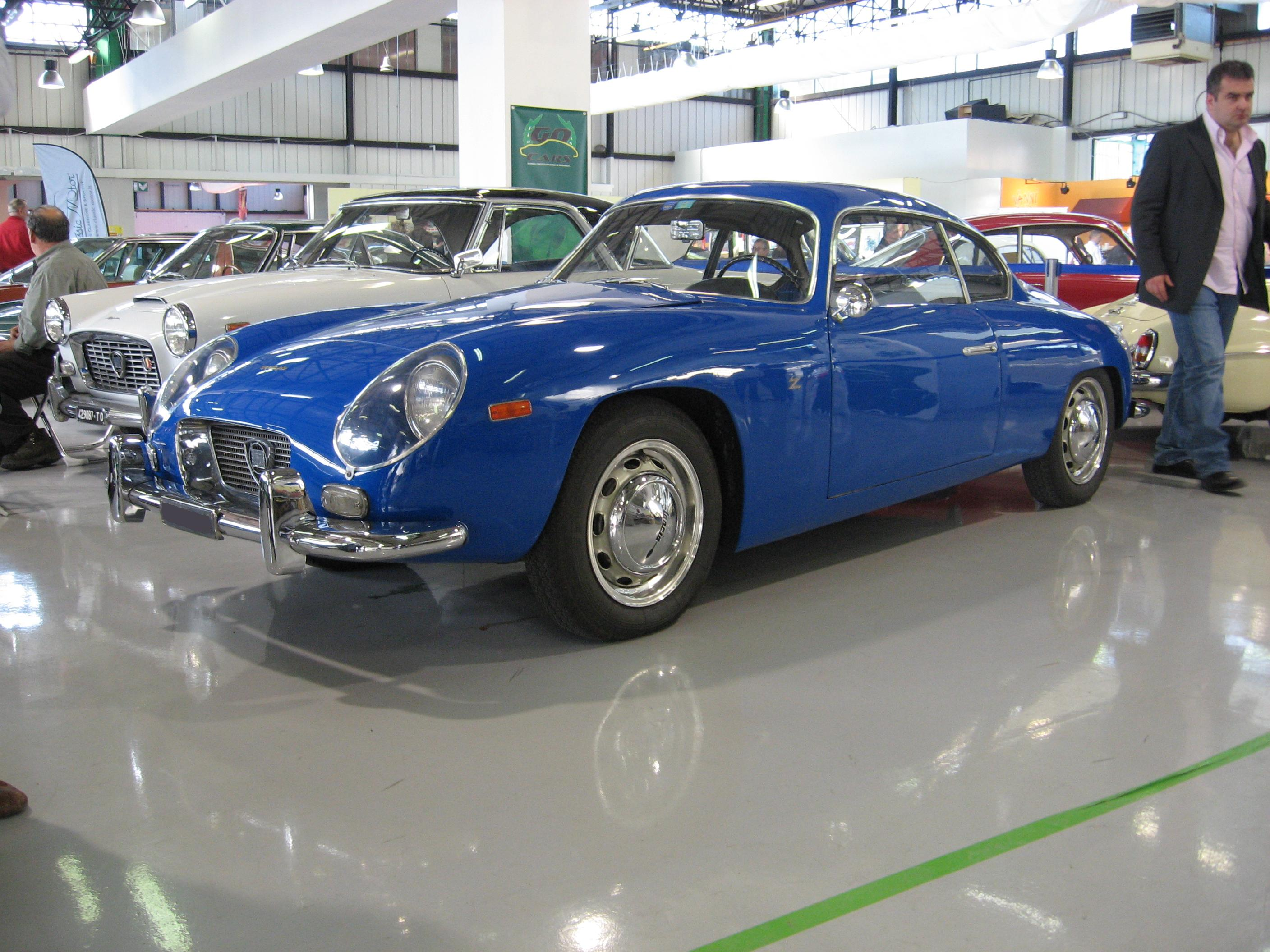 Subject